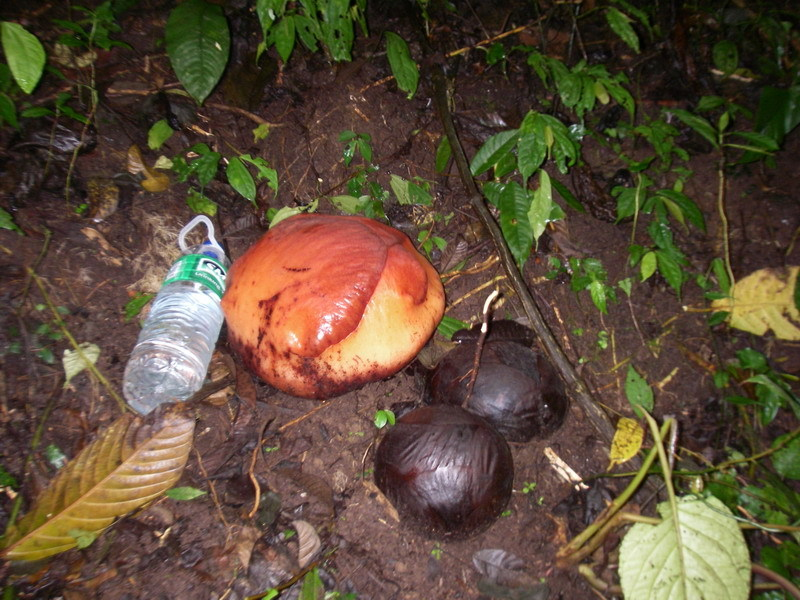 Rafflesia arnoldii